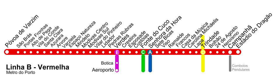 user:PedroPVZ